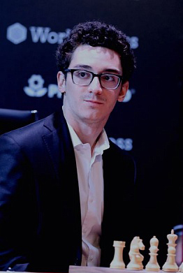 Фабиано Каруана, Турнир Претендентов 2018